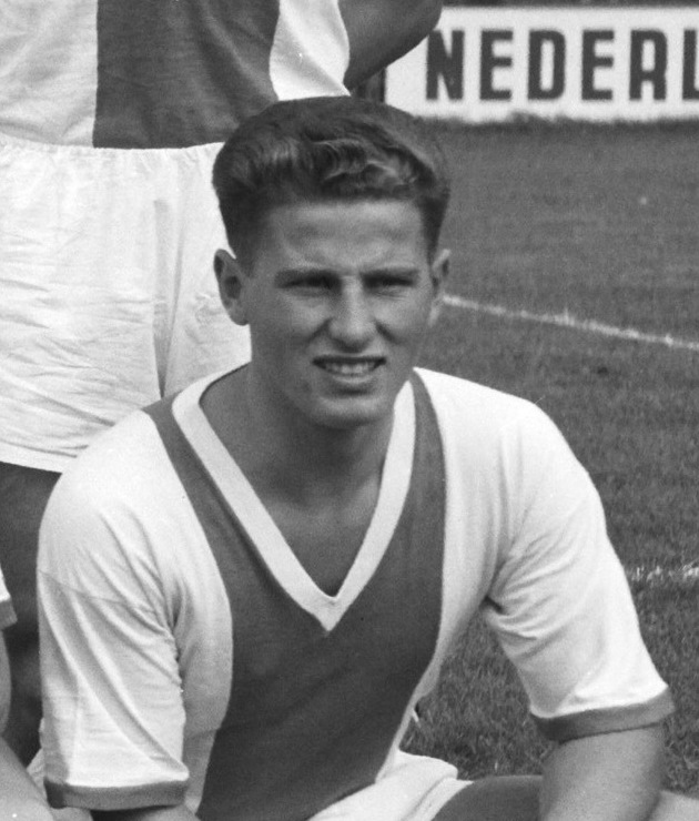 Jan Seelen.